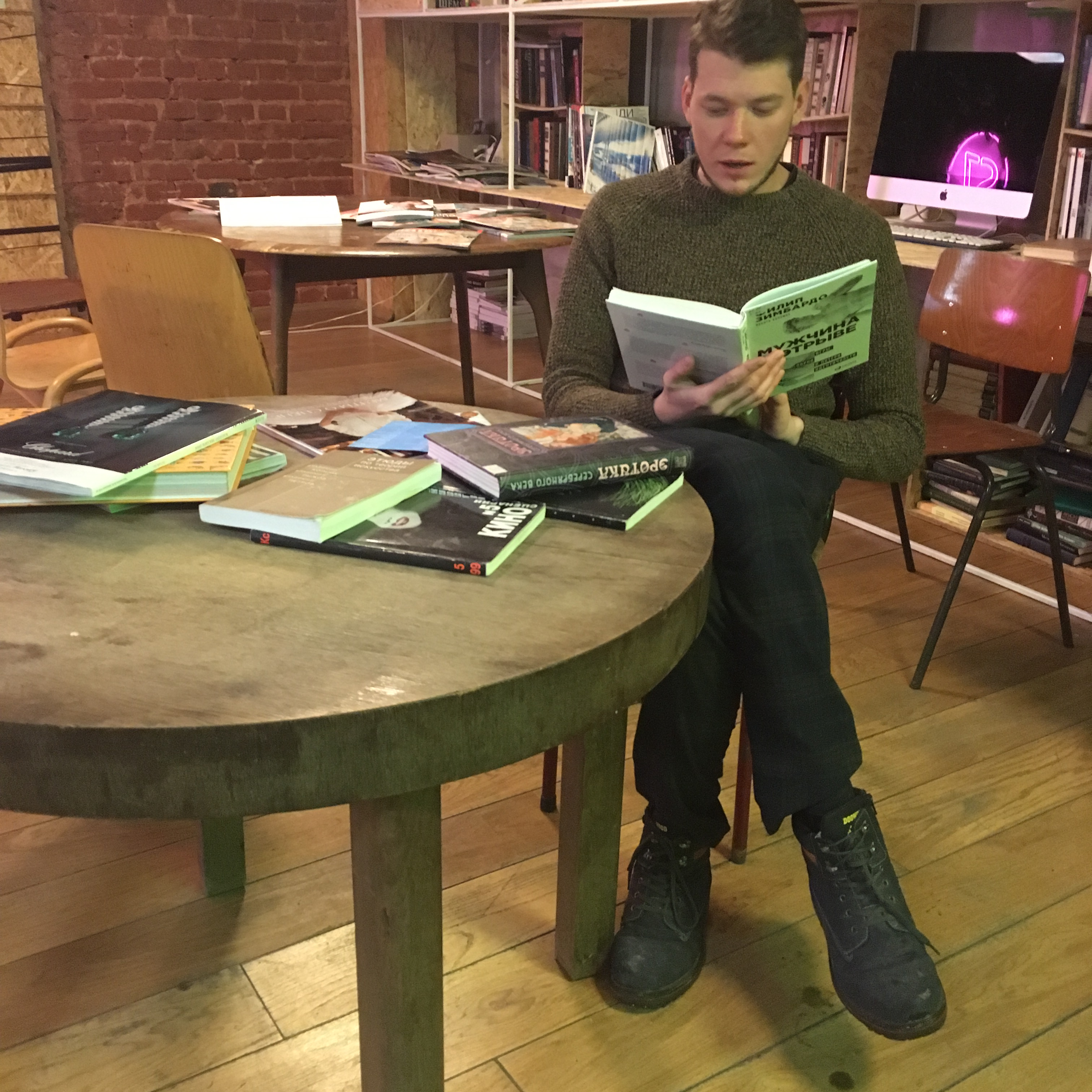 Сергей Давыдов в Гоголь-Центре, 2018 Фотосессия для Центральной универсальной научной библиотеке им.Н.А. Некрасова